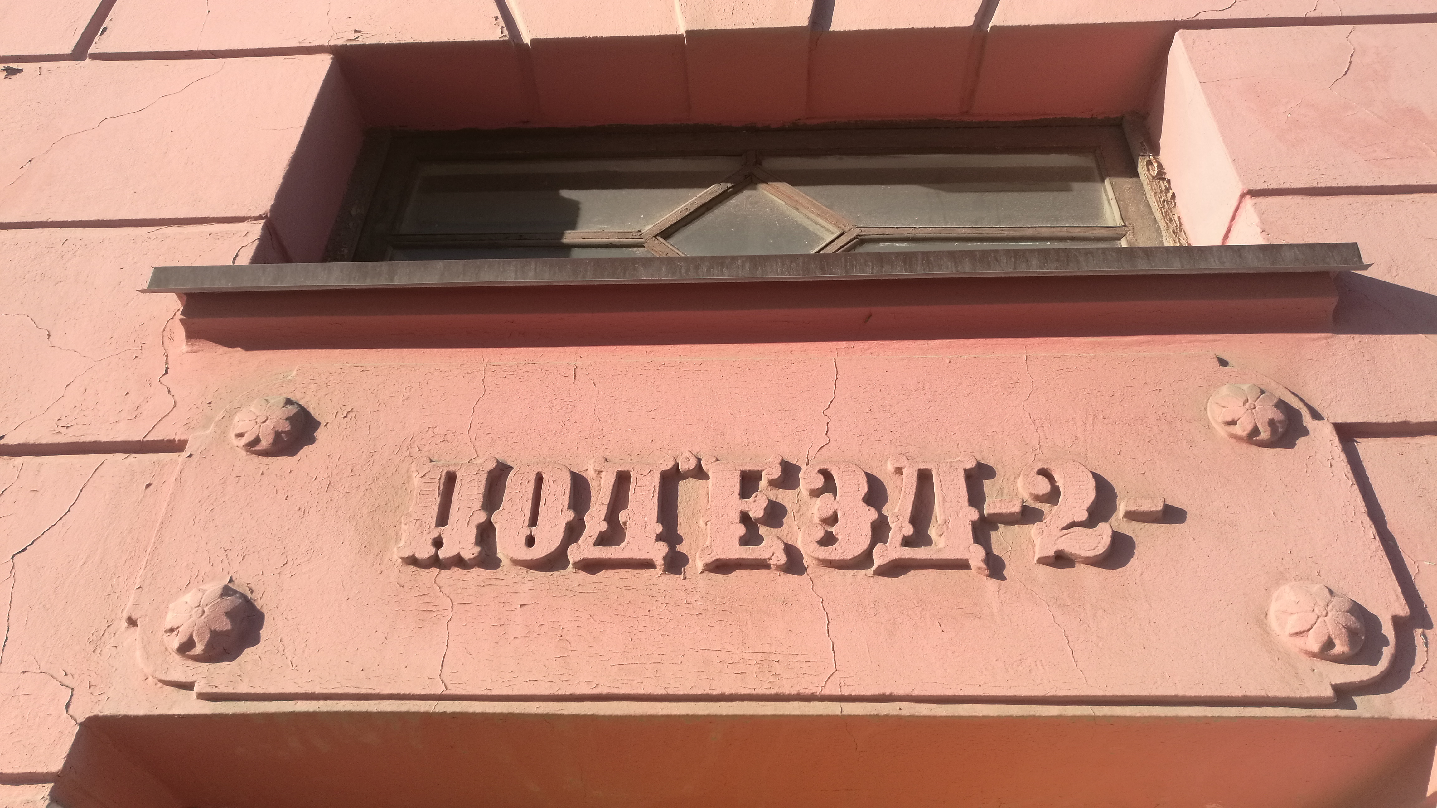 Surskribo kun apostrofo sur la domo N 45 en strato Respubliko. Tjumeno, Rusio.